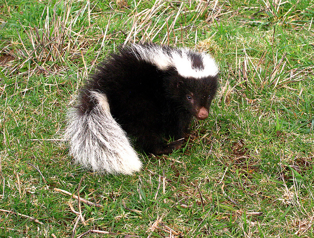 Los Tayos, Panguipulli, Chile